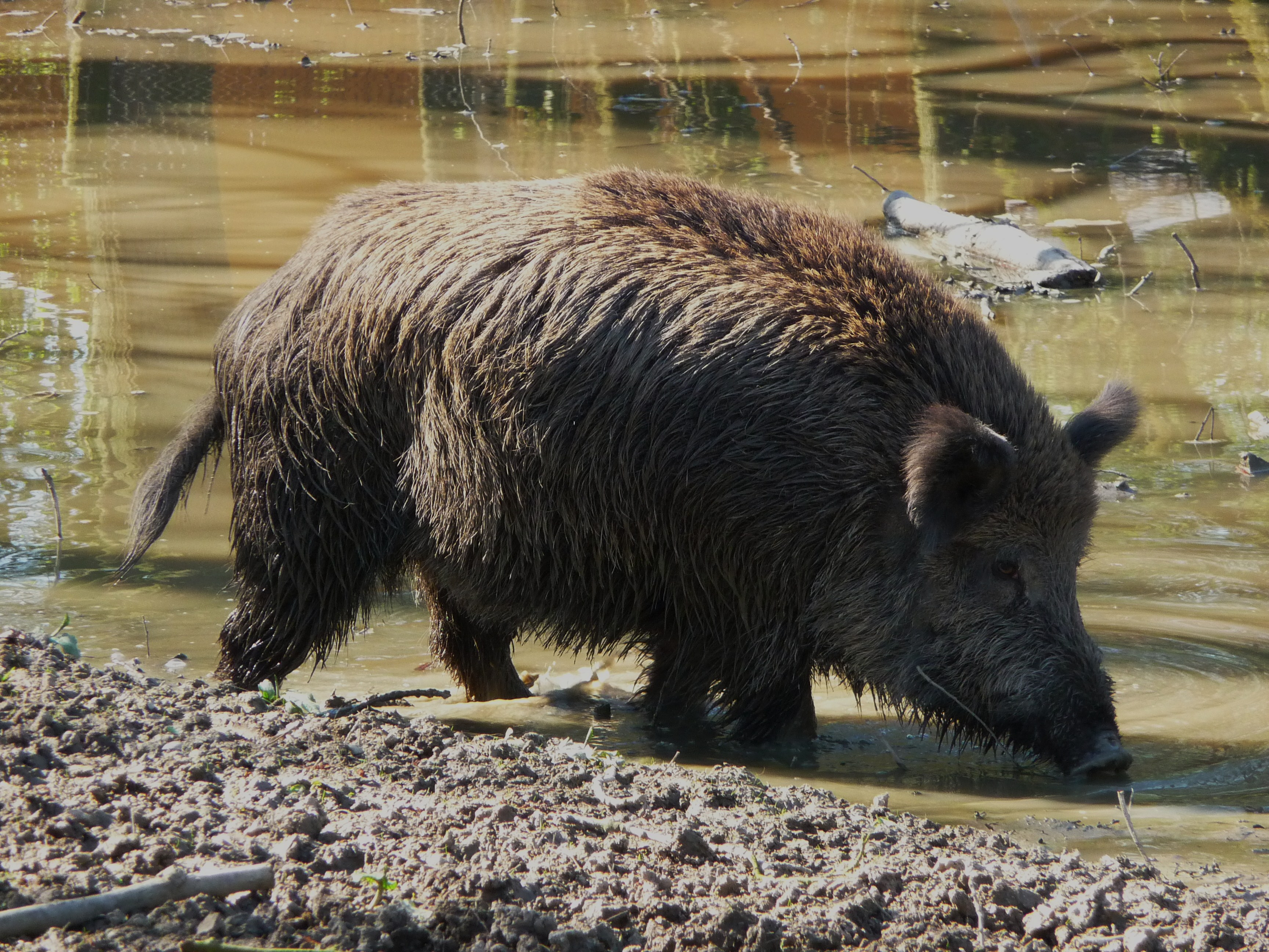 Ausgewachsenes Wildschwein (Sus scrofa) beim Suhlen